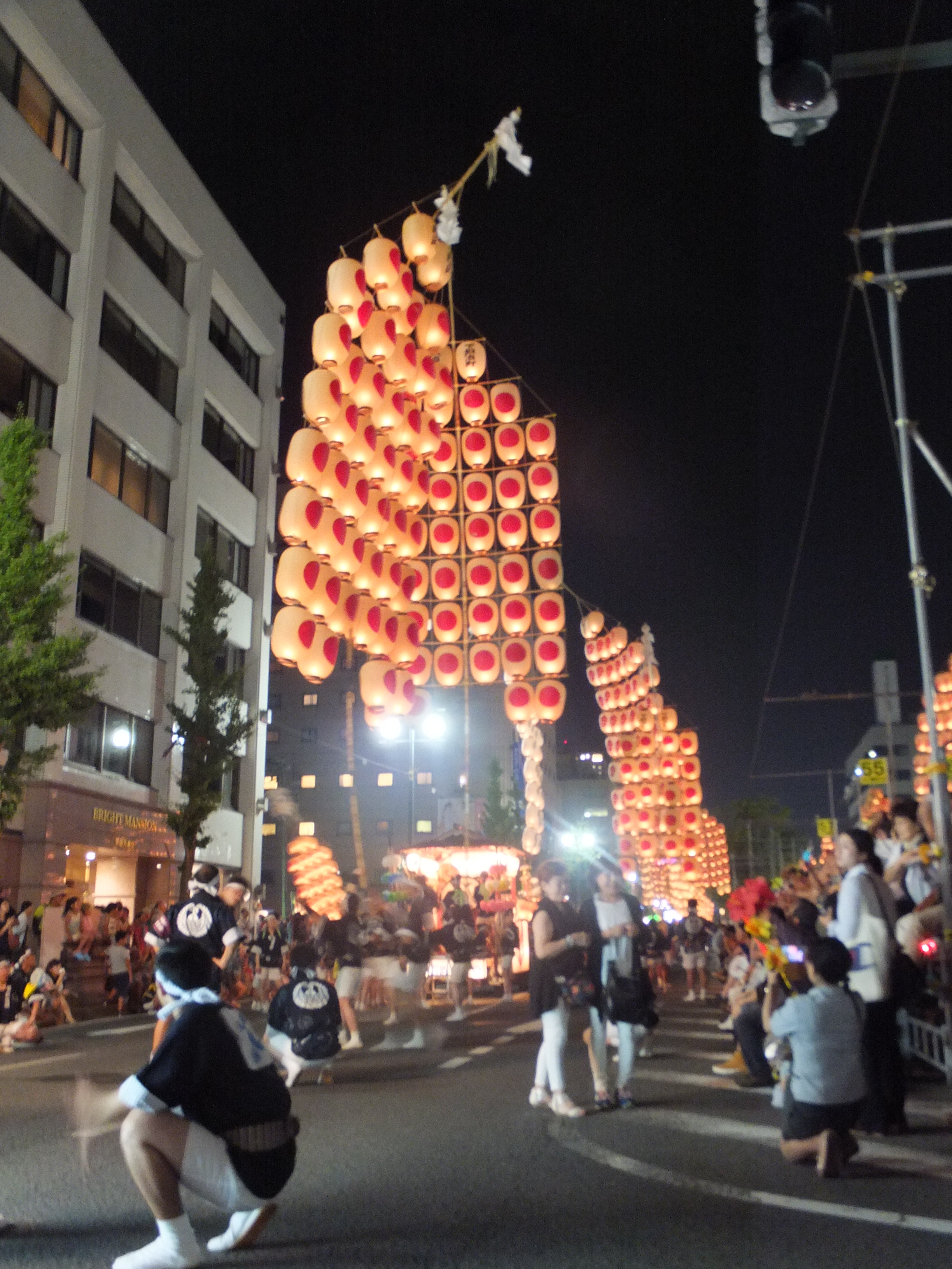 秋田竿燈祭り（2015年。秋田県秋田市）